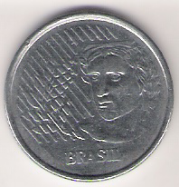 Verso de uma moeda de 1 Real do primeiro tipo existente. This graphic was created with GIMP.